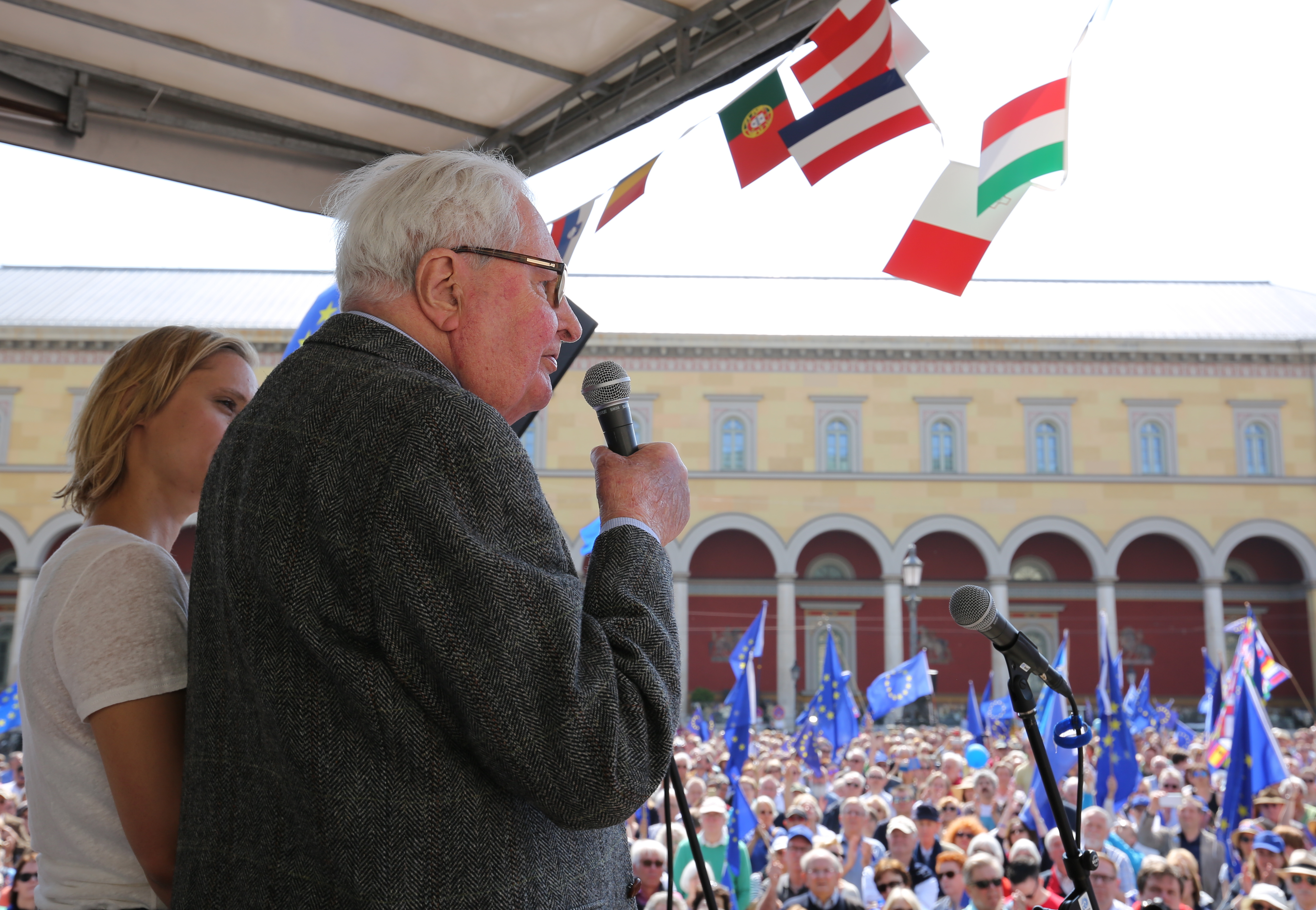 Hans-Jochen Vogel am 9. April 2017 auf der Pulse of Europe Veranstaltung in München.